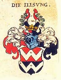 Wappen Ilsung, aus Johann Siebmachers Wappenbuch